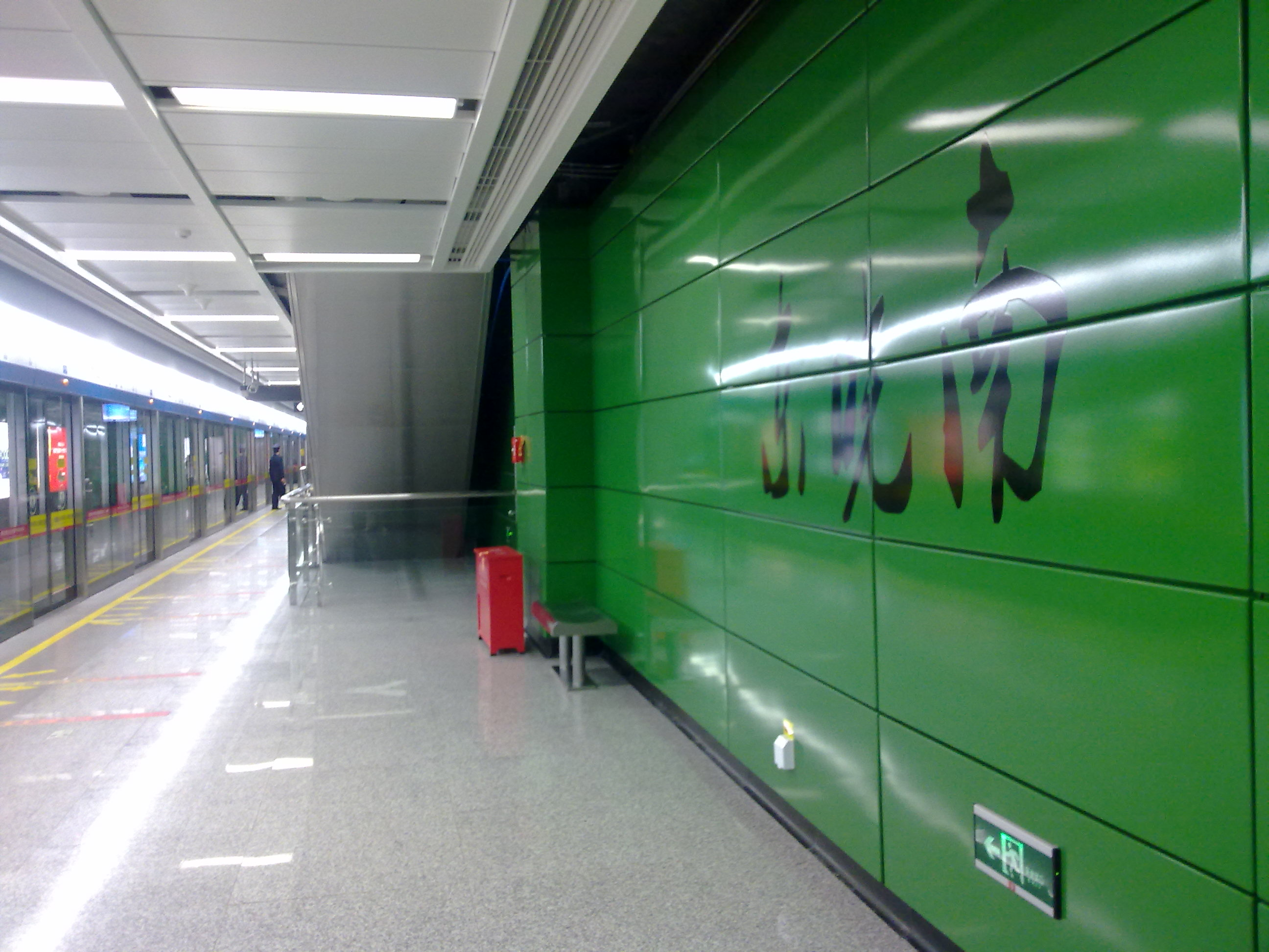 廣州地鐵東曉南站站台